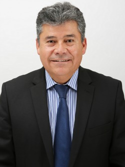 Marcos Espinosa Monardes